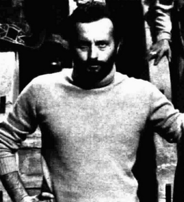 Italian director Piero Schivazappa